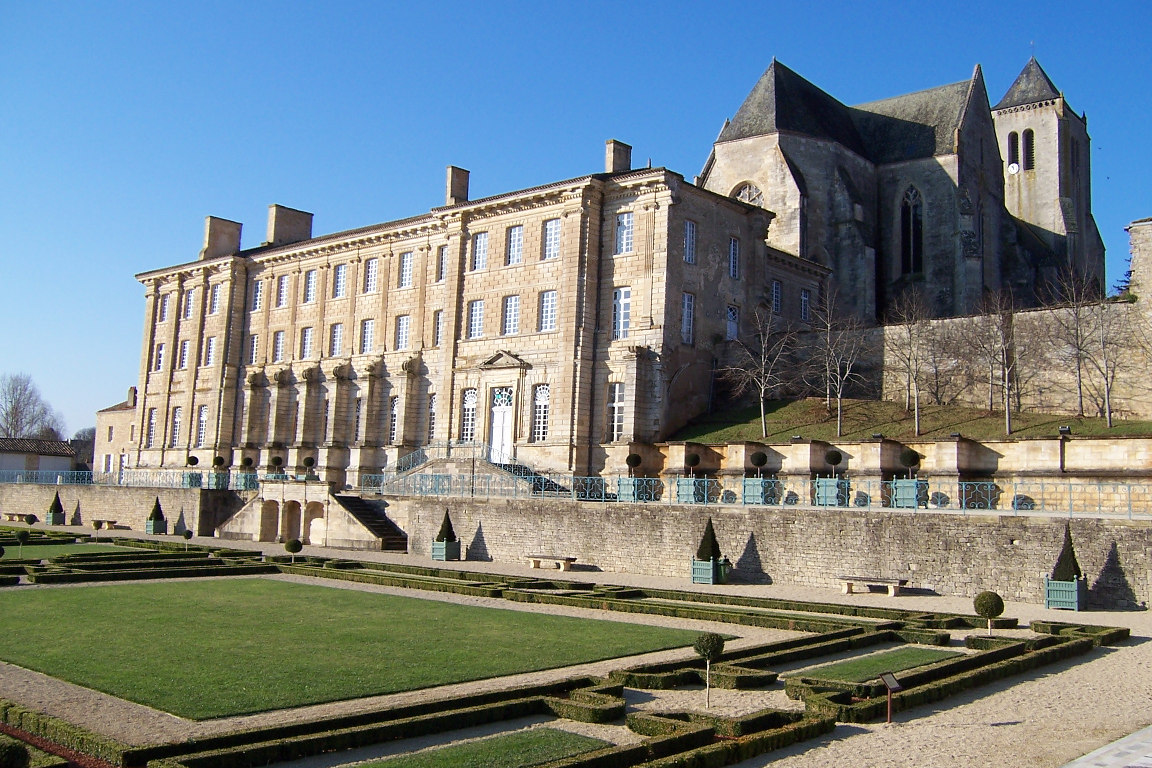 Abbaye royale Notre-Dame et son jardin à la française, ville de Celles sur Belle, département des Deux-Sèvres, France